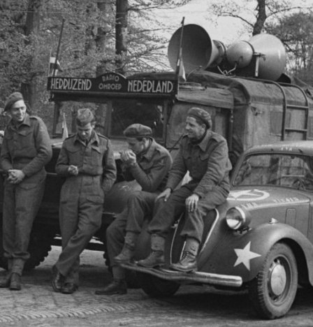 Het Militair Gezag bij de Naald in Apeldoorn (Loolaan). Op de foto is een voertuig van Radio Omroep Herrijzend Nederland te zien. Datum mei 1945